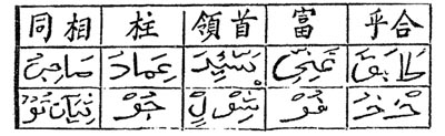 Un ejemplar de un diccionario xiao'erjing chino-árabe de los primeros días de la República Popular de China.